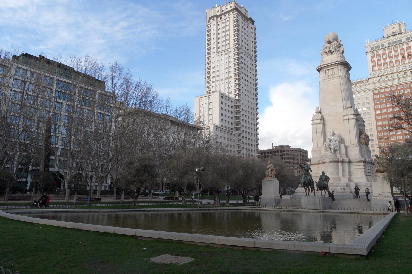 Don Quijote / Sancho Panza @ Plaza de España